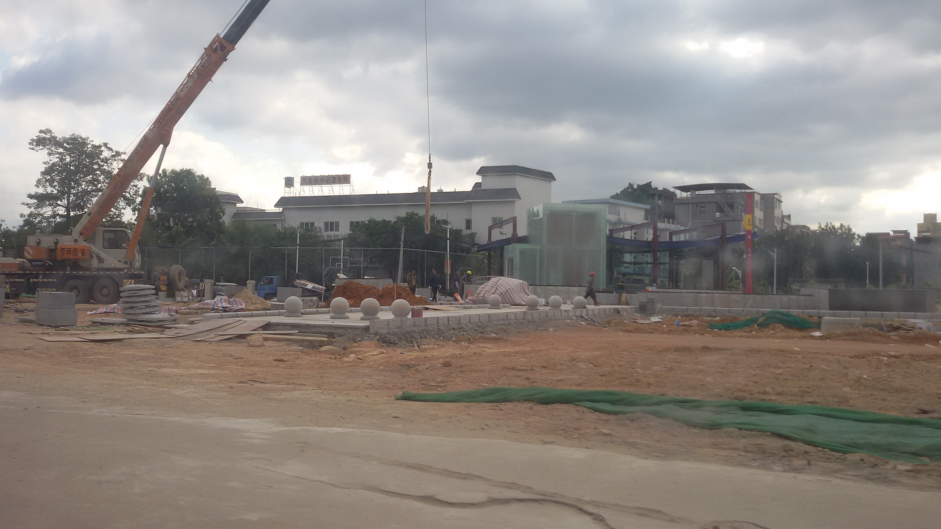 粵語: 2017年12月16號，喺廣州地鐵14號綫嘅知識城站基本上起好嗮，出入口附近啲工地喺度搞緊最後嘅手頭功夫。